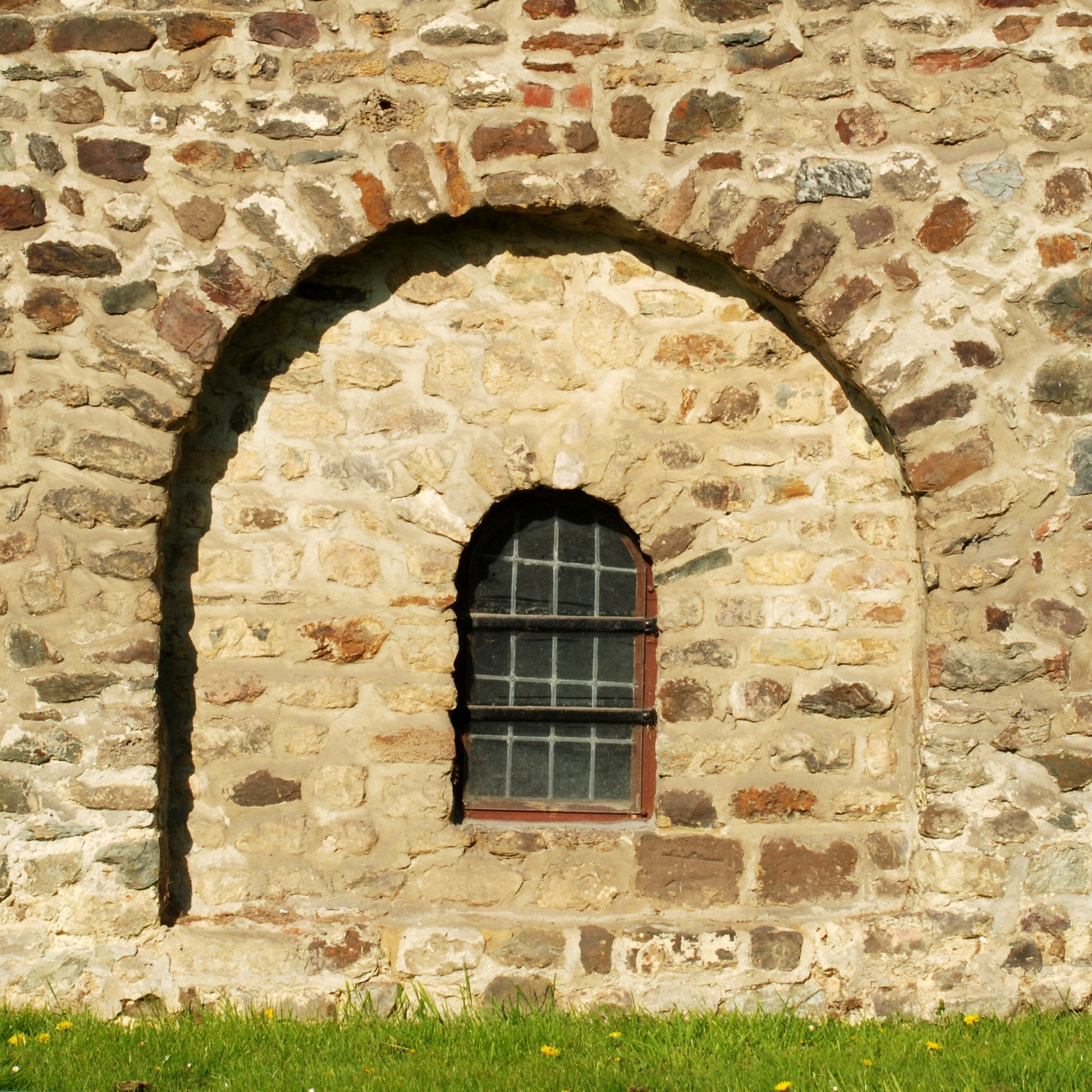 Belgique - Mousty - Église Notre-Dame